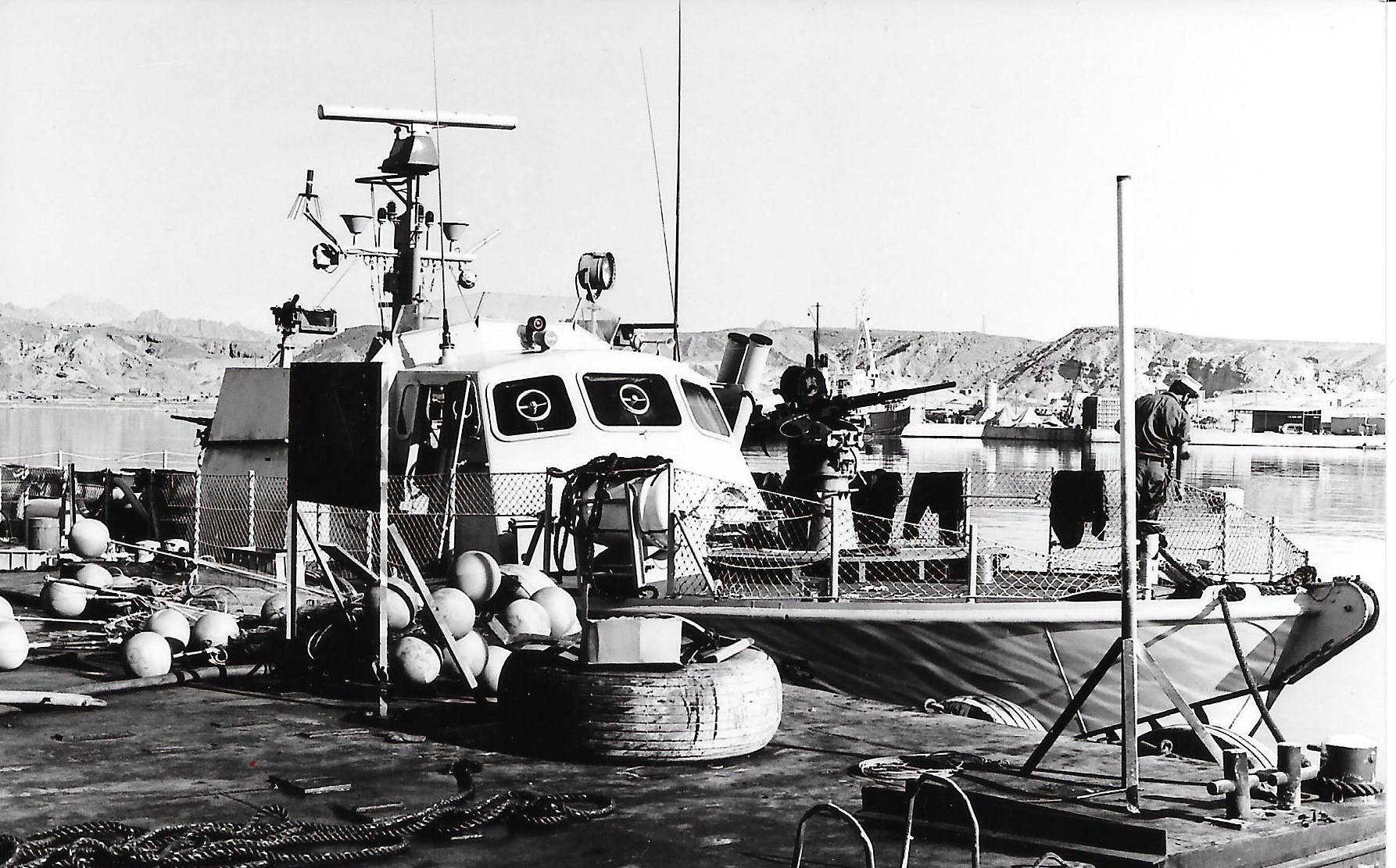 ספינת דבור בדוברת העגינה בשארם א-שייח' 1973